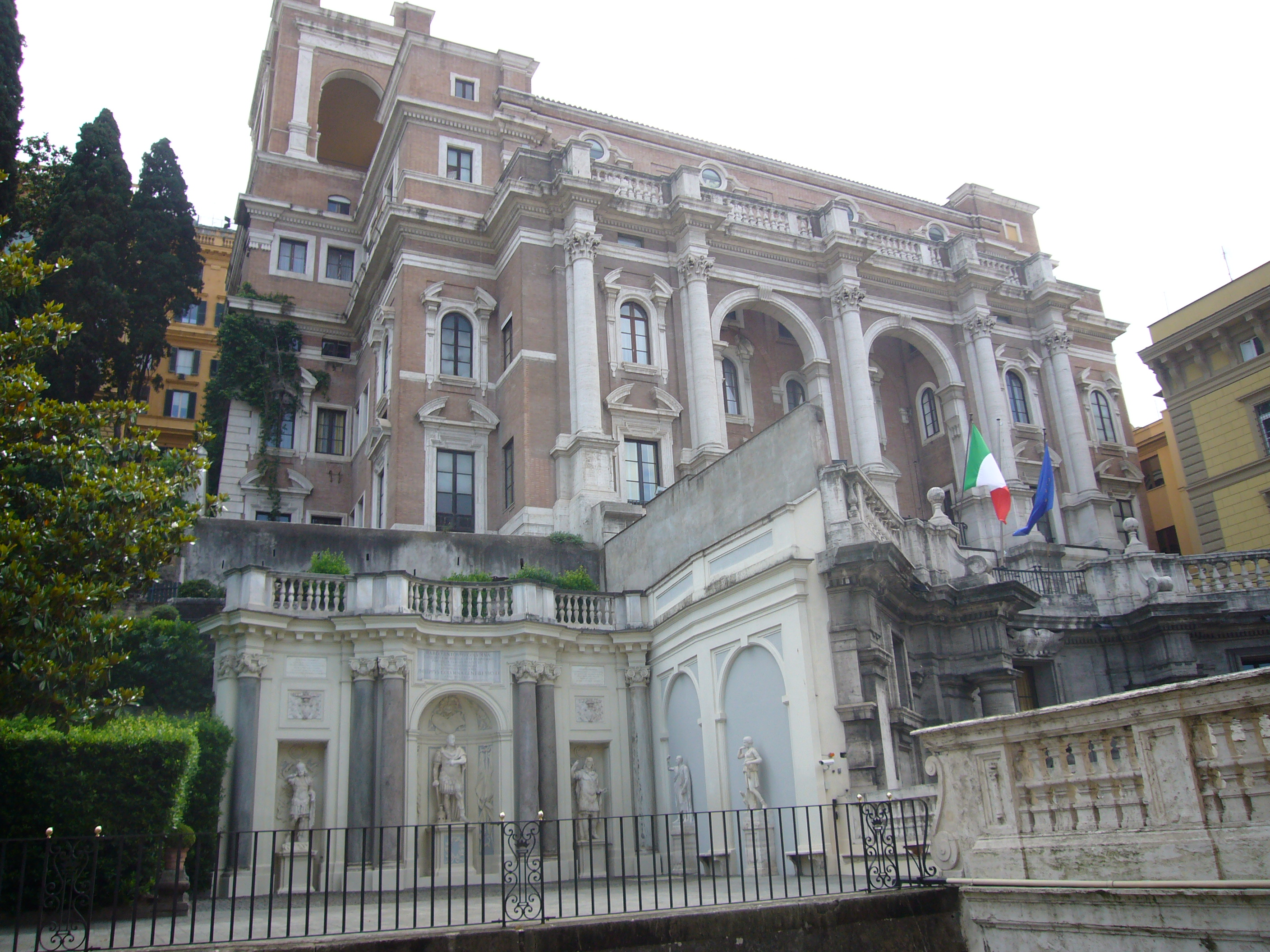 Roma, via della Pilotta: Palazzo INAIL (Armando Brasini 1934) e scorcio del giardino di Palazzo Colonna. L'edificio giallo sullo sfondo, a sinistra, è il palazzo Mengarini.